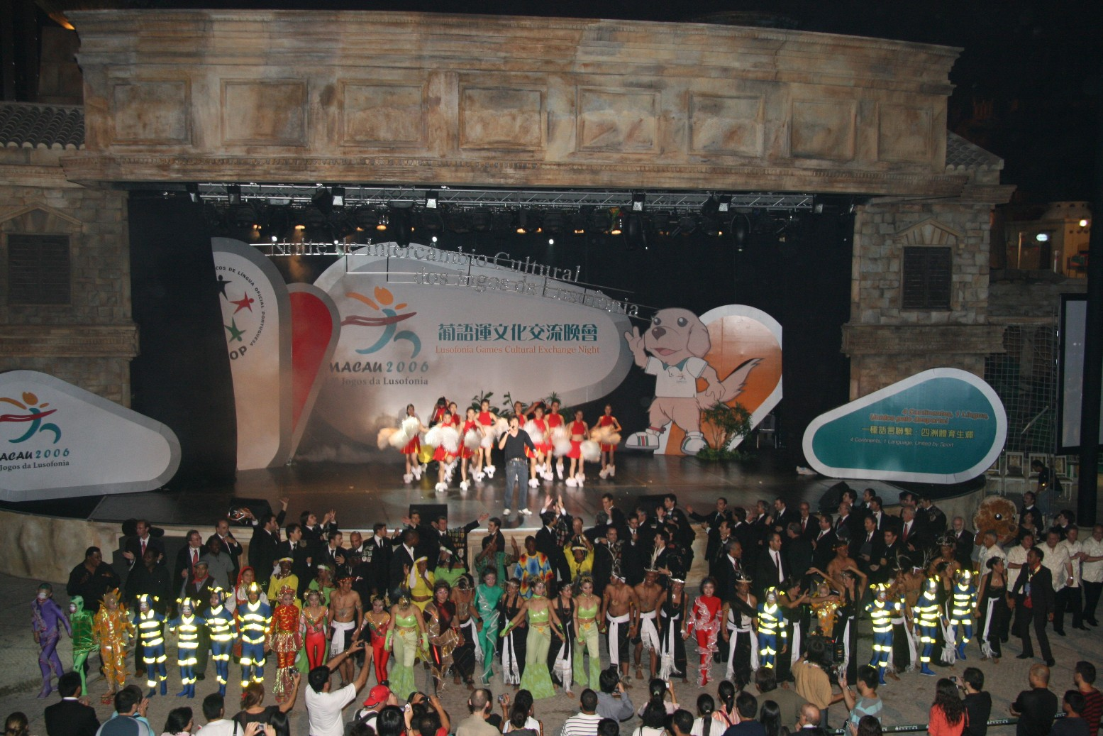 O Germano Guilherme nas Jogos da Lusofonia de Macau